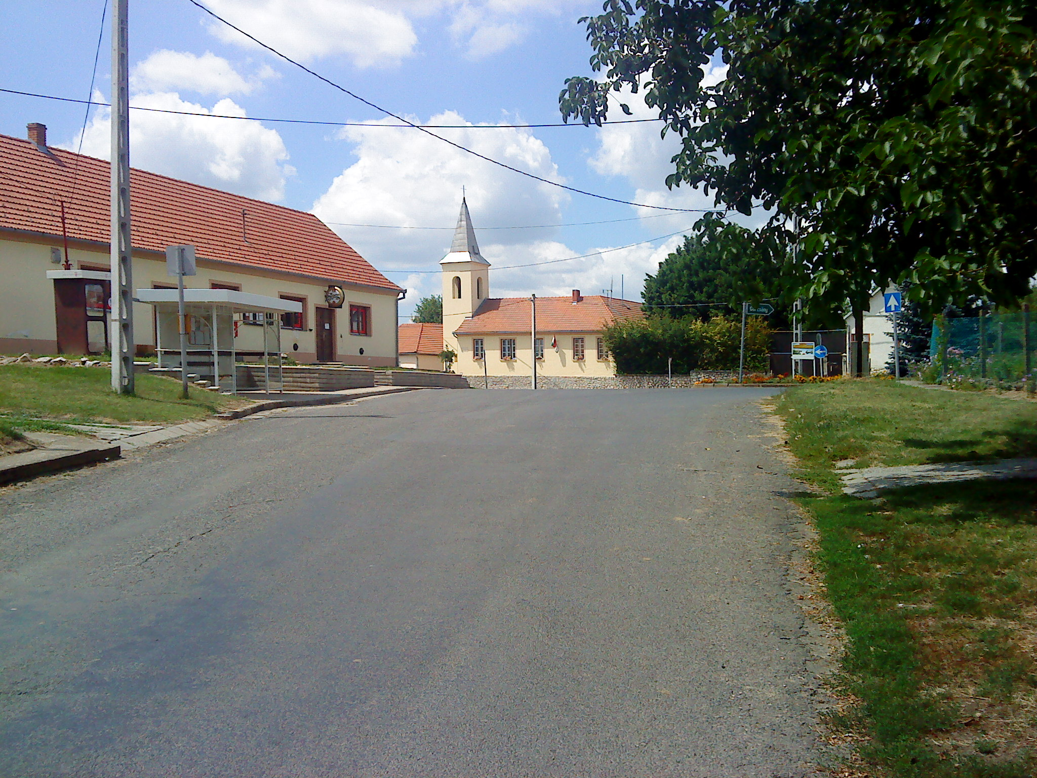 Szilvás központja iskolakápolnával